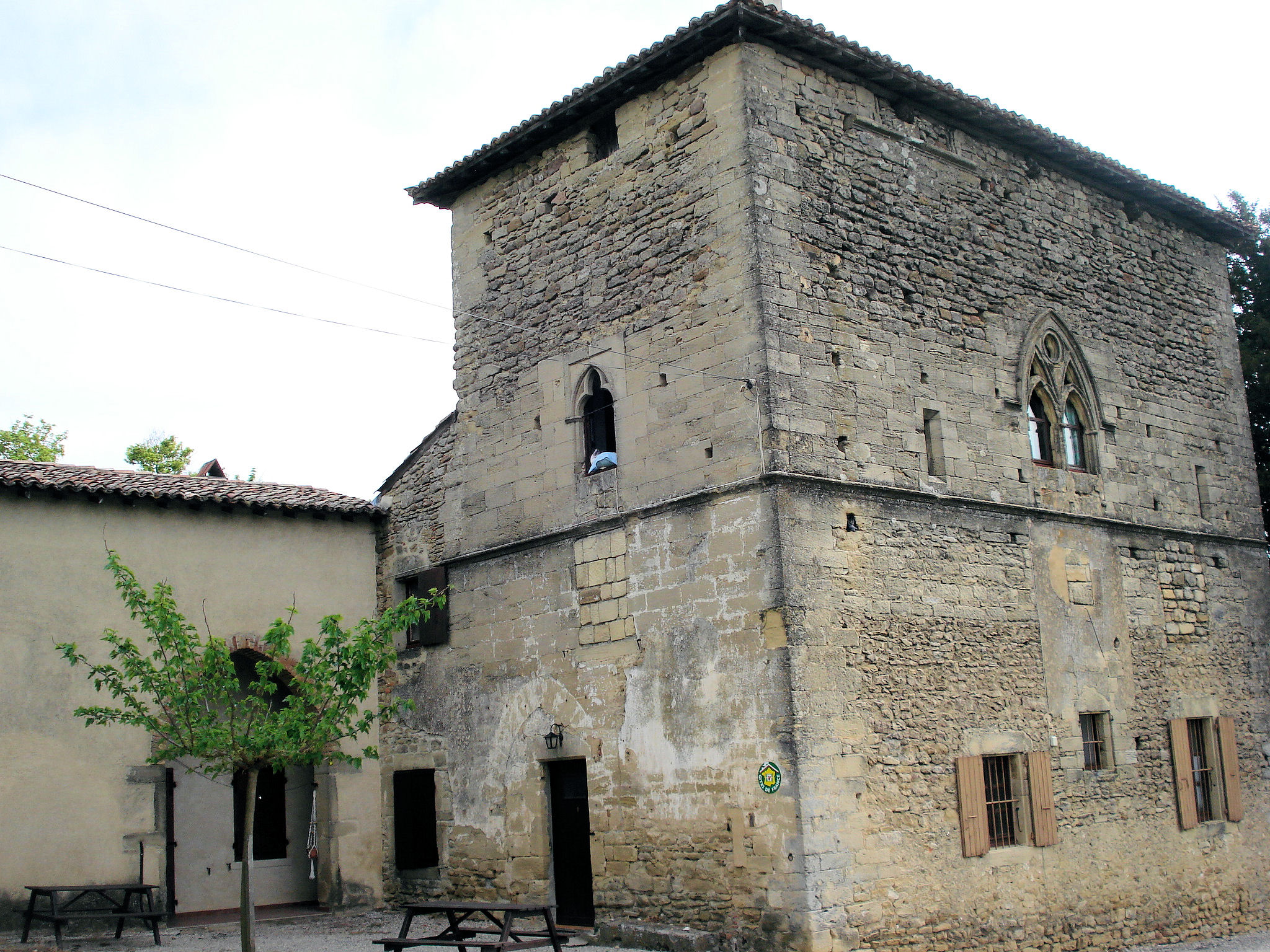 restes de l'ancien château situés près de l'église à Bathernay, Drôme